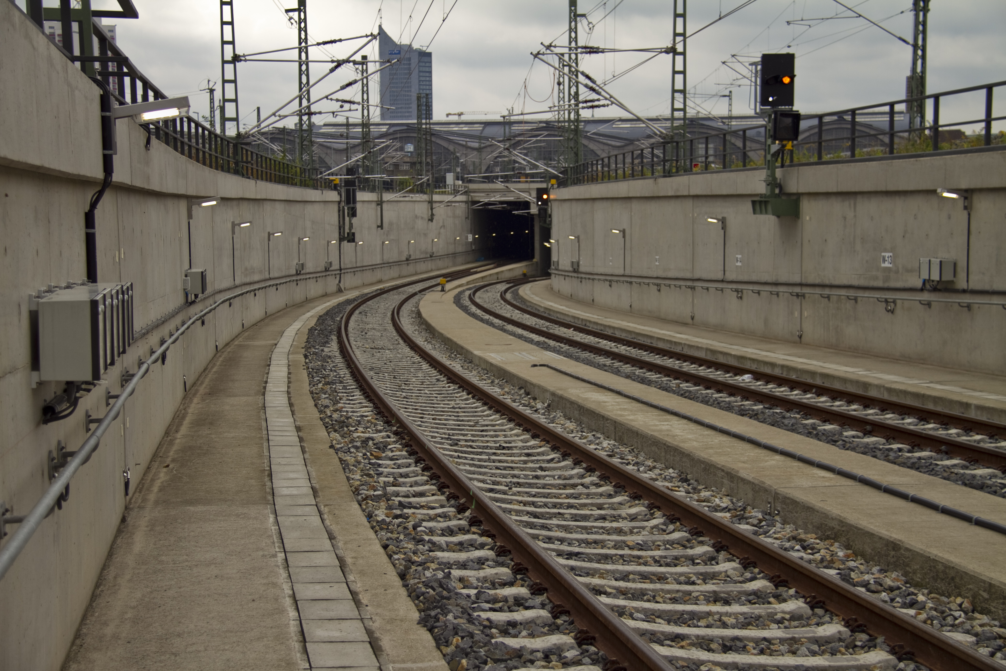 Nordwesteinfahrt City-Tunnel Leipzig